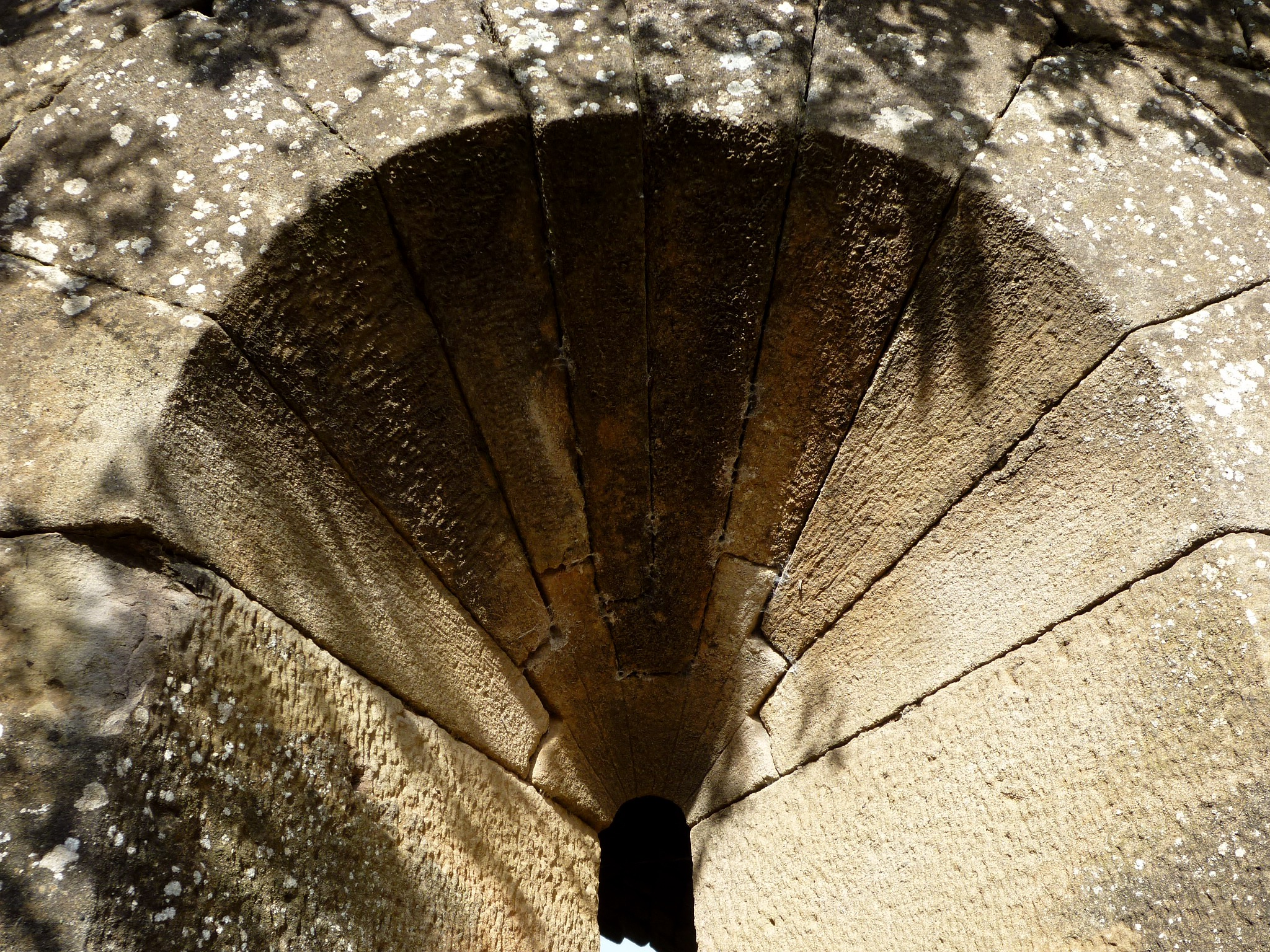 Capella de Santa Magdalena de Vilaprinyó (Castellar de la Ribera): detall constructiu de la finestra de l'absis